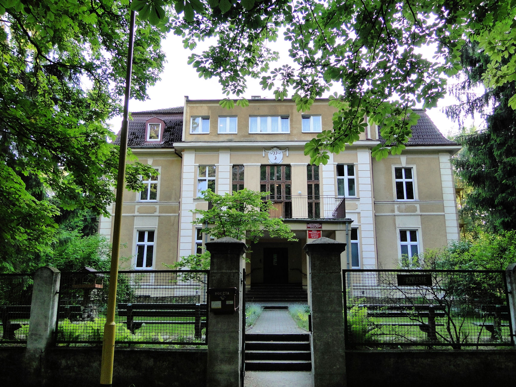 Młodzieżowy Ośrodek Socjoterapii przy ul. Przylesie w Szczecinie Płoni